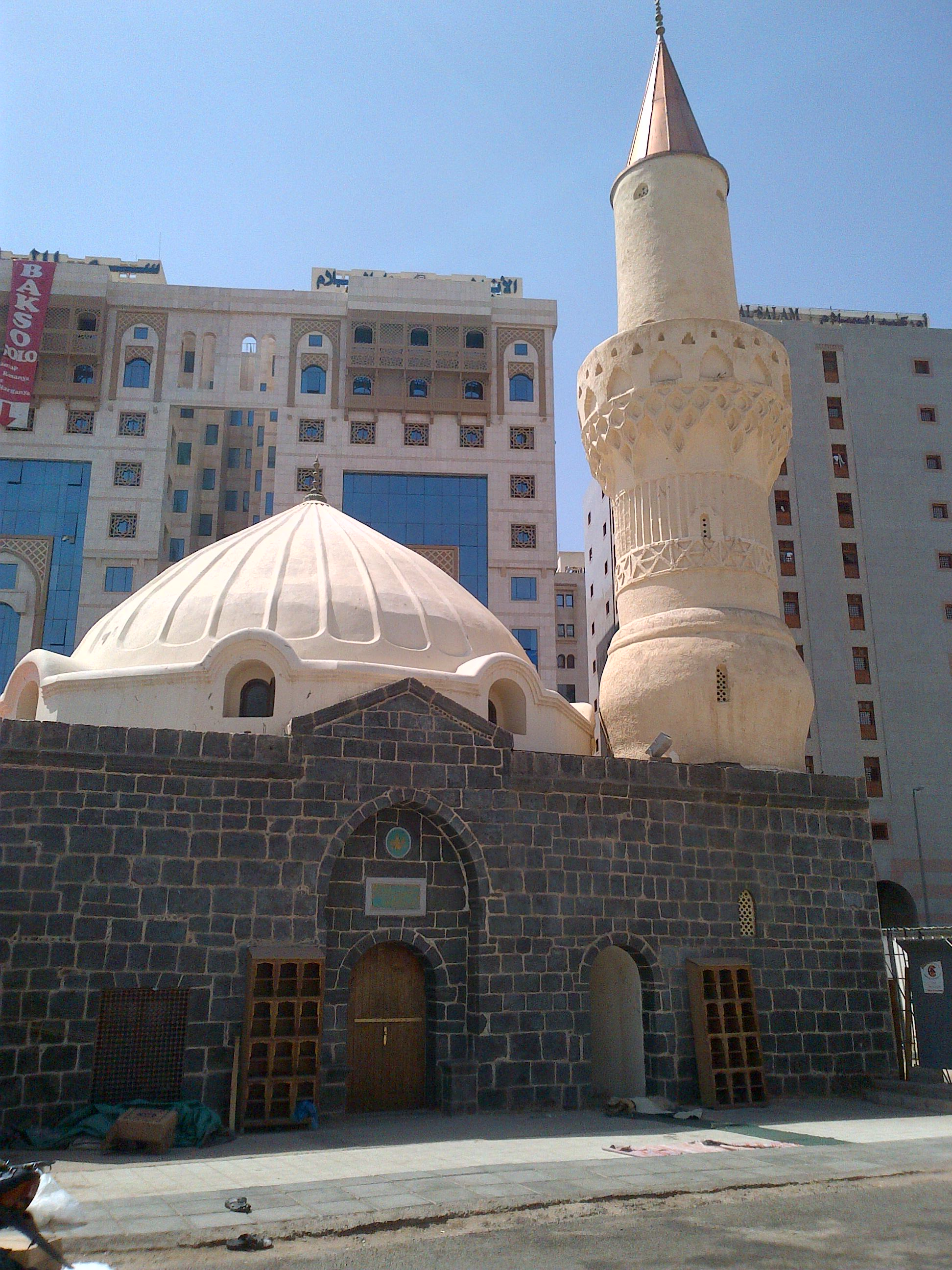 Terletak di Barat Masjid Nabawi